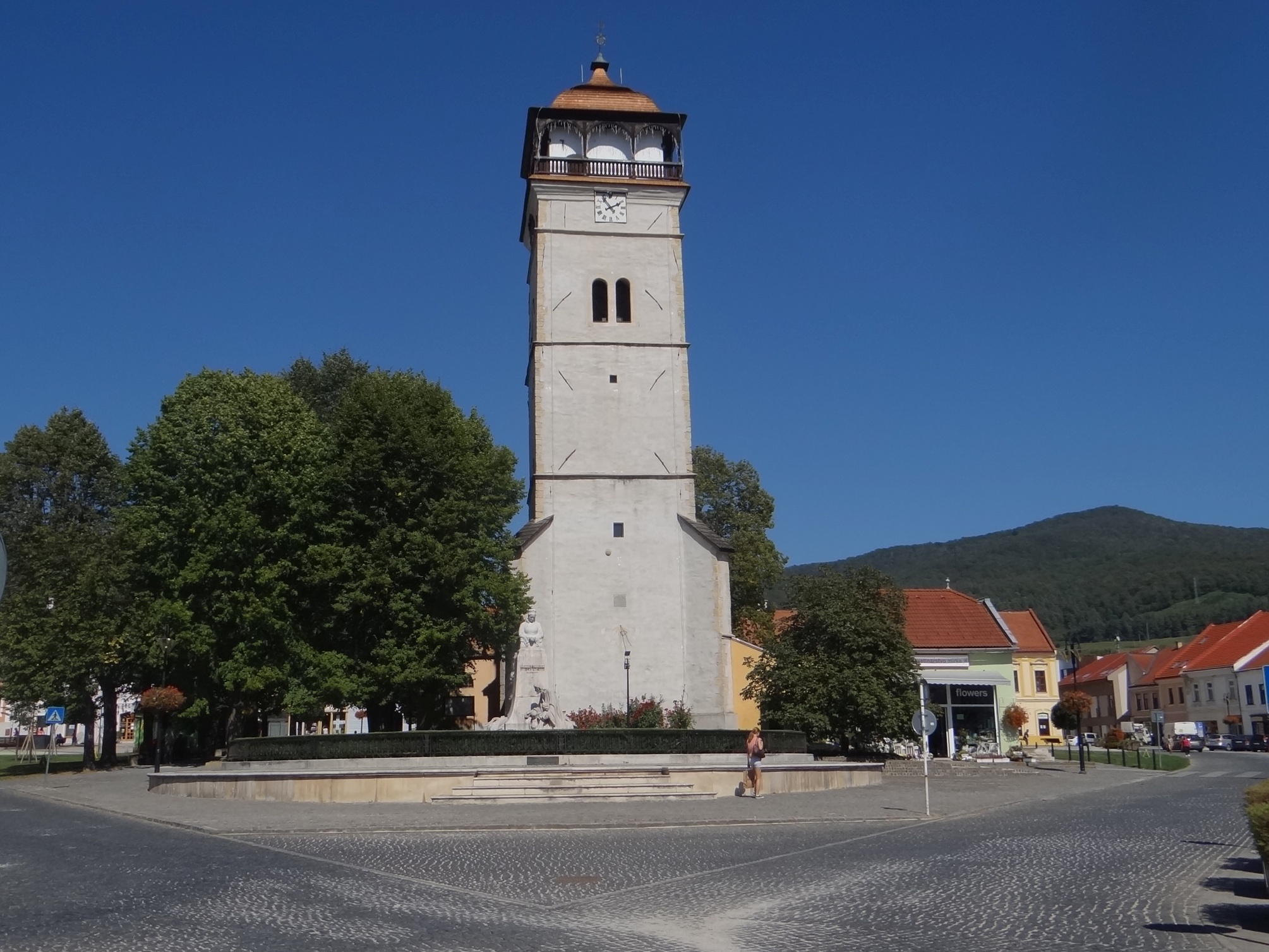 Rožňava